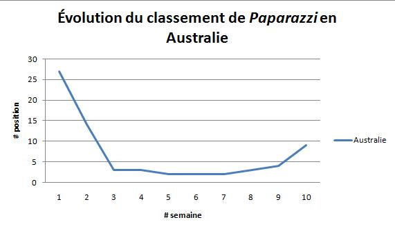 Diagramme retrcant l'évolution du classement de Paparazzi en démontrant ses 10 premières semaines dans le classement australien.